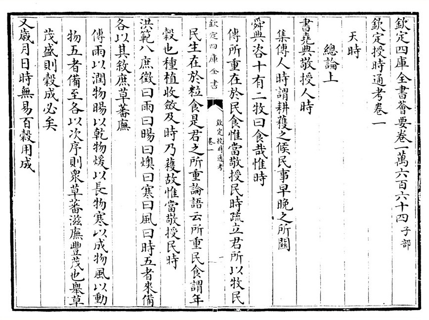 《欽定授時通考》卷一頁一（Qin ding Shou shi tong kao, Ch1, Page1）